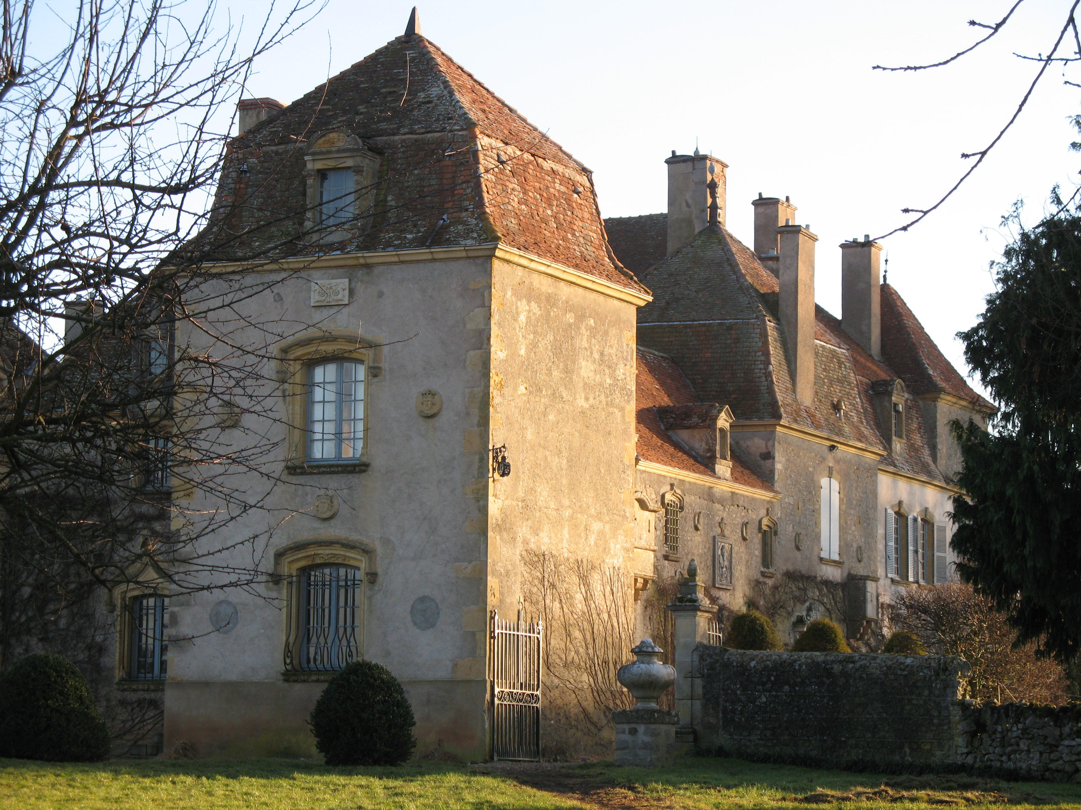 château de Chaumont - Oyé (Saône-et-Loire)